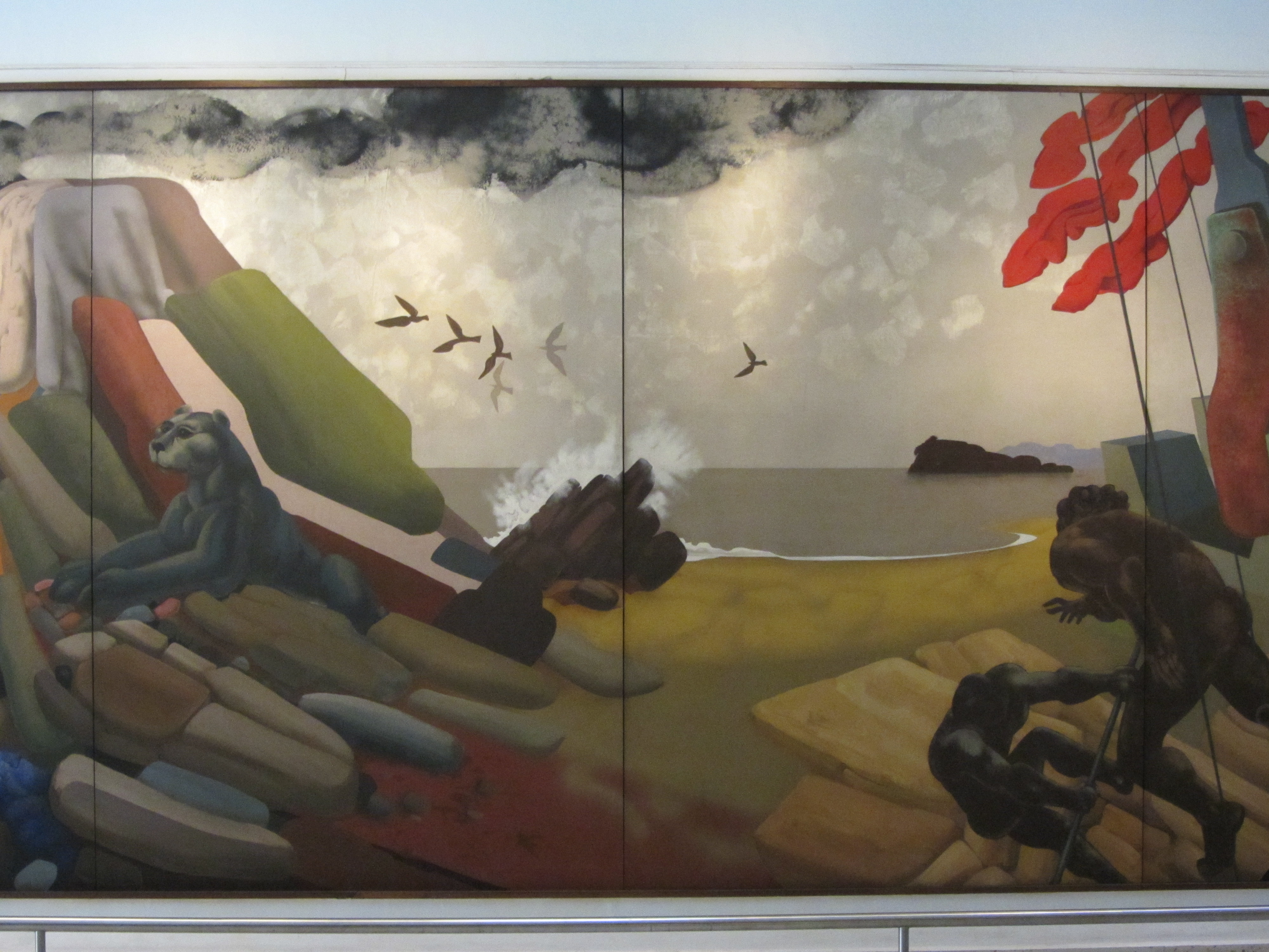 José Venturelli - Chile, mural (detalle), 1972, GAM